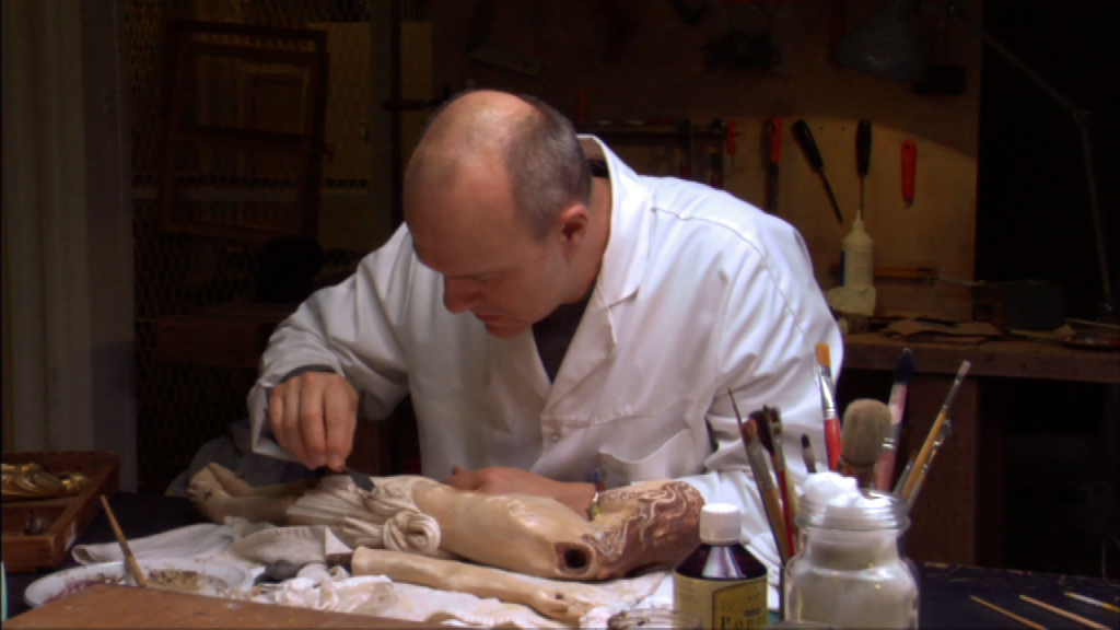 Un Eclat (photogramme 2)